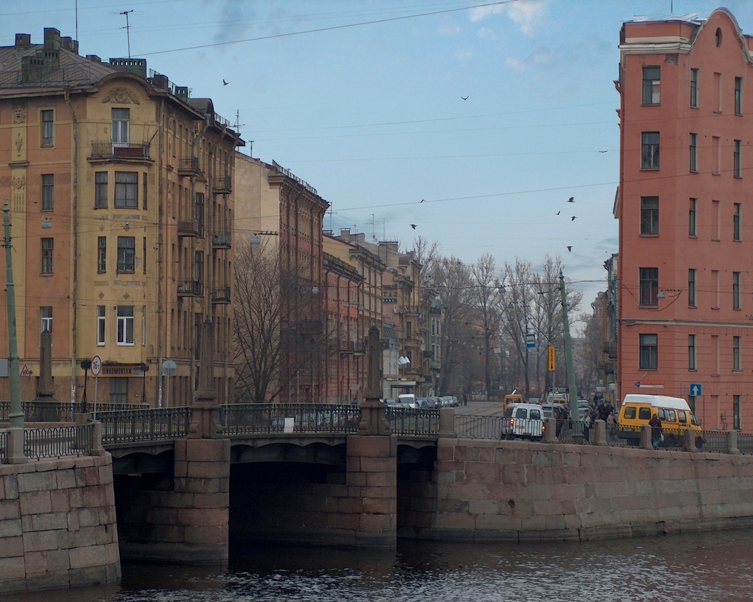 Мало-Калинкин мост.